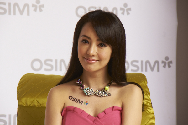 台灣藝人關穎